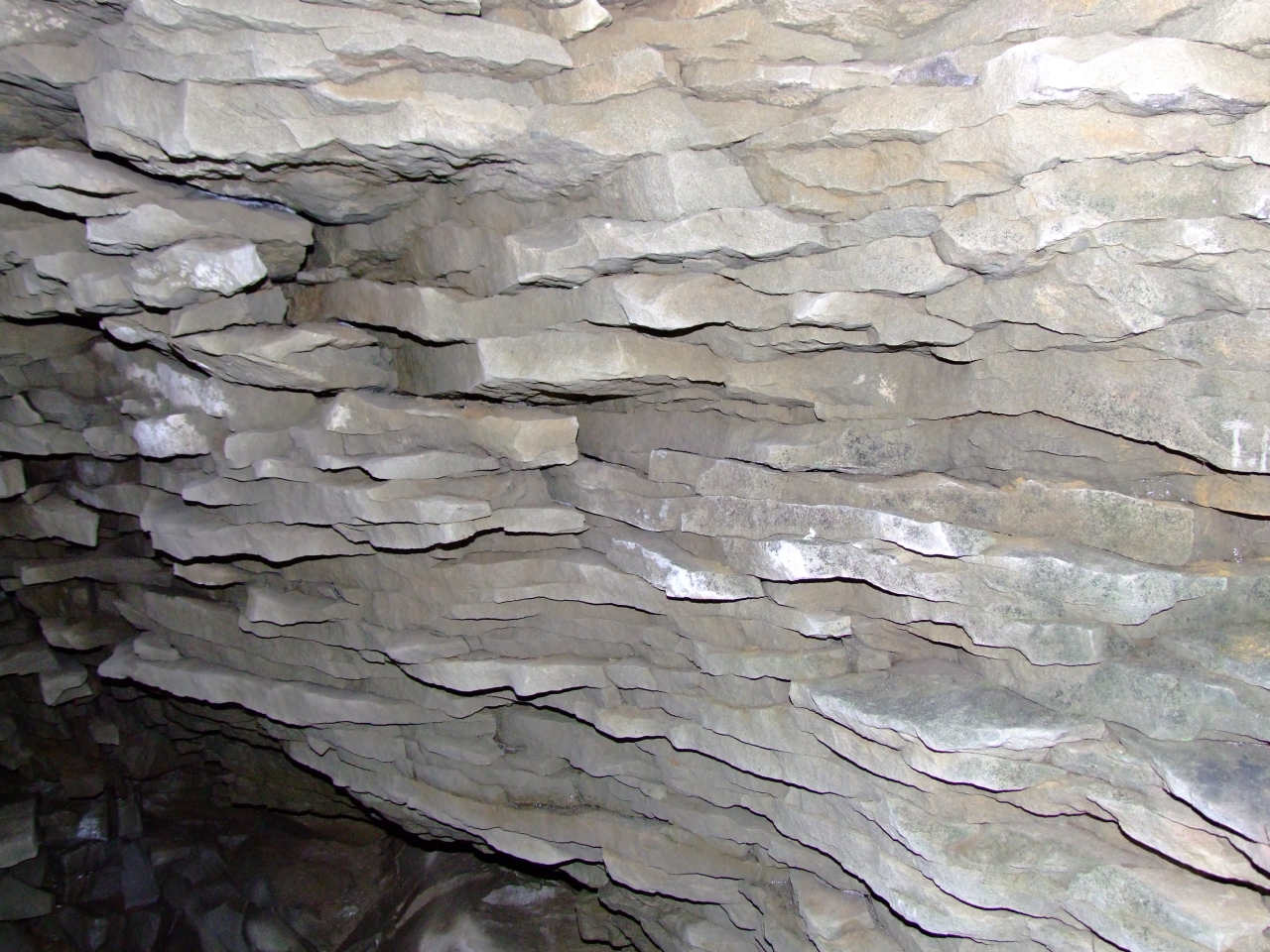 Jaskinia Zimna Dziura (Beskid Wyspowy)